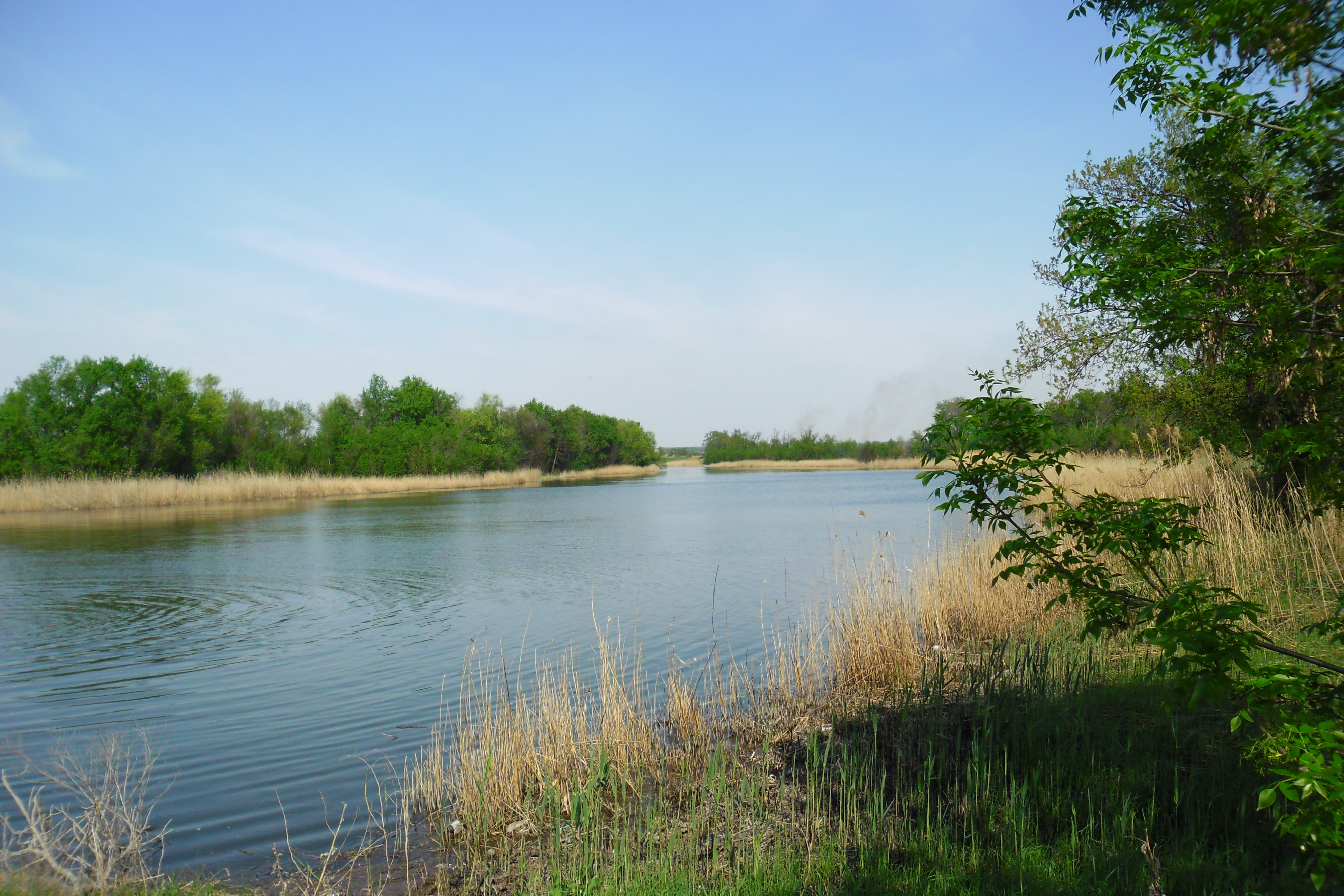 Вільнянка.: Фото